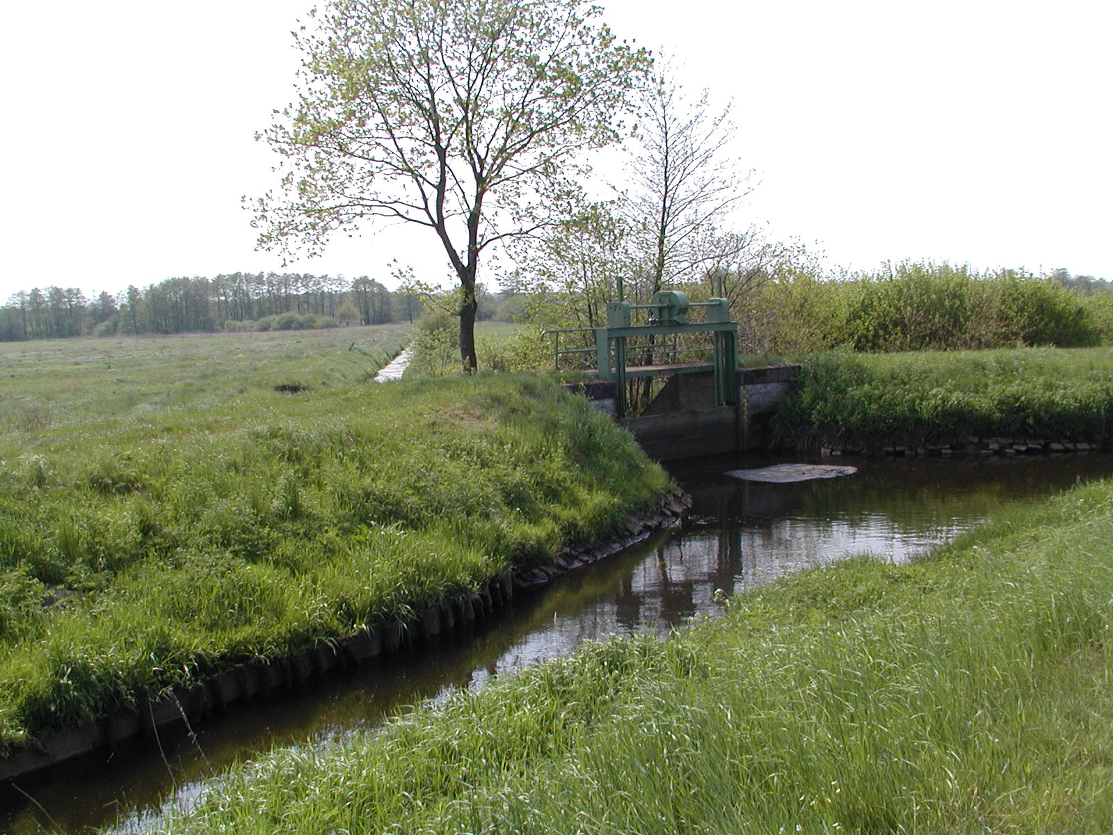 Ein Sperrwerk im Randkanal bei Stinstedt